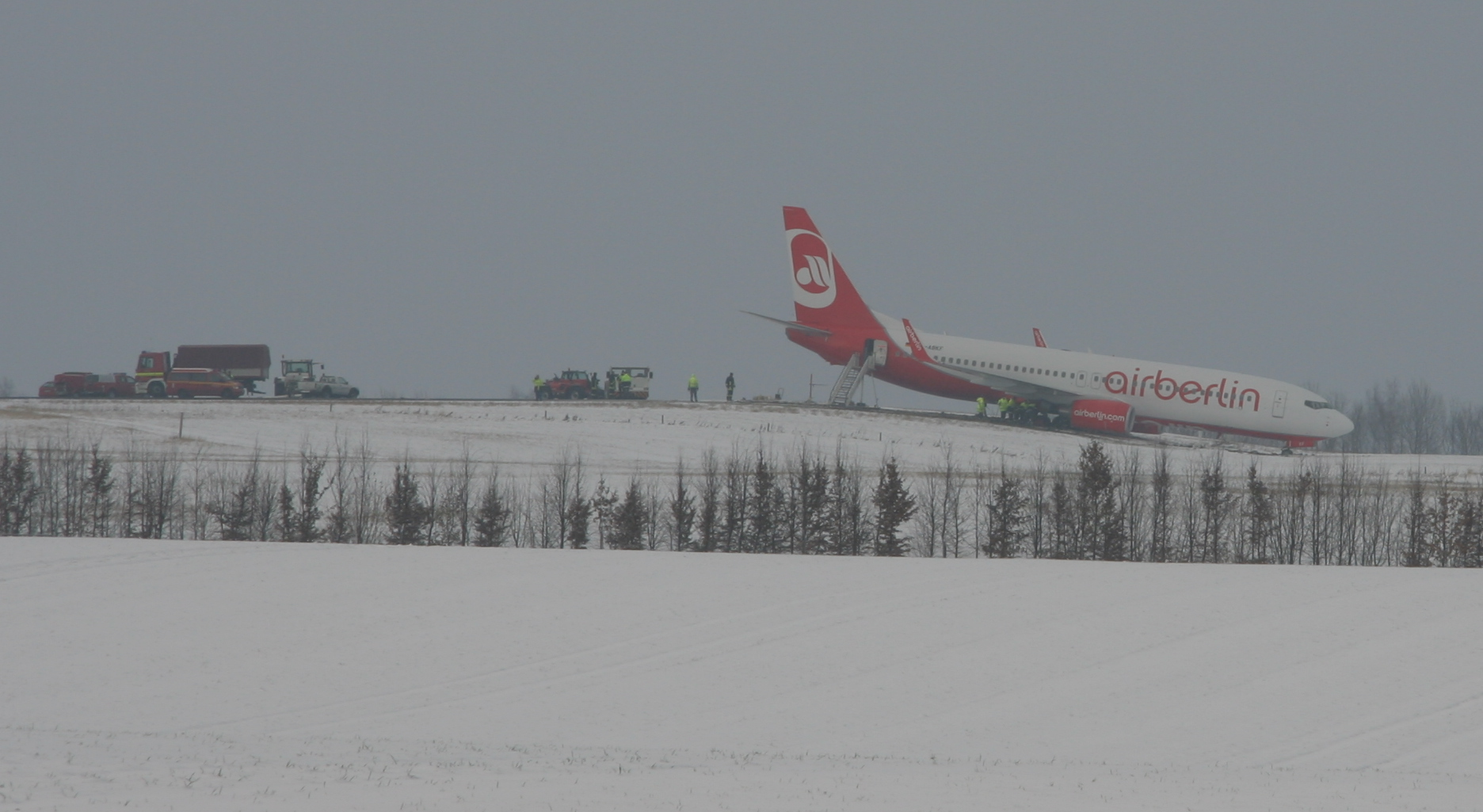 Am 3. Januar 2010 rutschte morgens um 7.05 am Flughafen Dortmund eine Boeing 737-800 der AirBerlin infolge eines Startabbruchs über das Ende der Startbahn in nordöstlicher Richtung hinaus